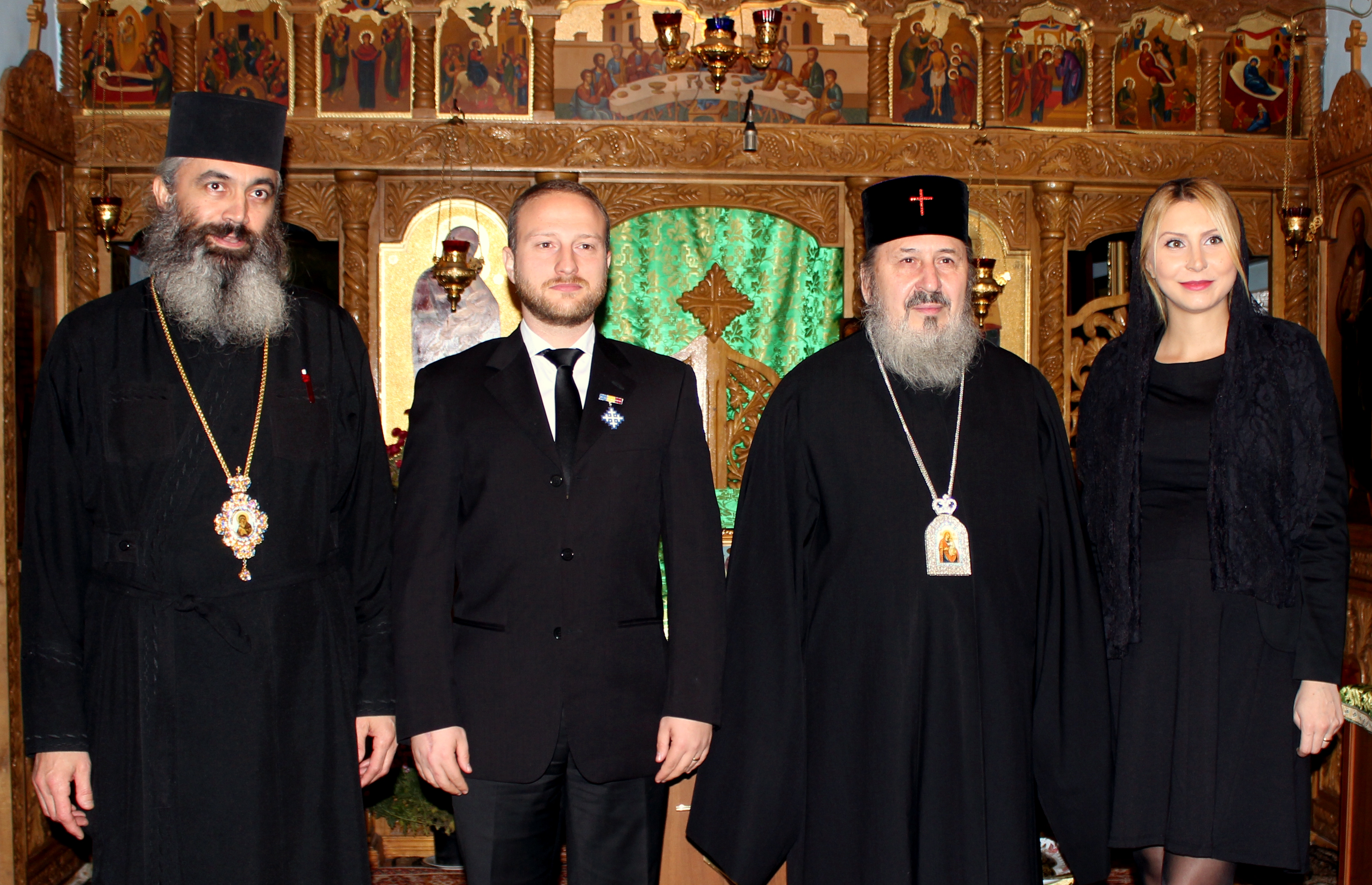 Crucea Mitrolopoliei Basarabiei